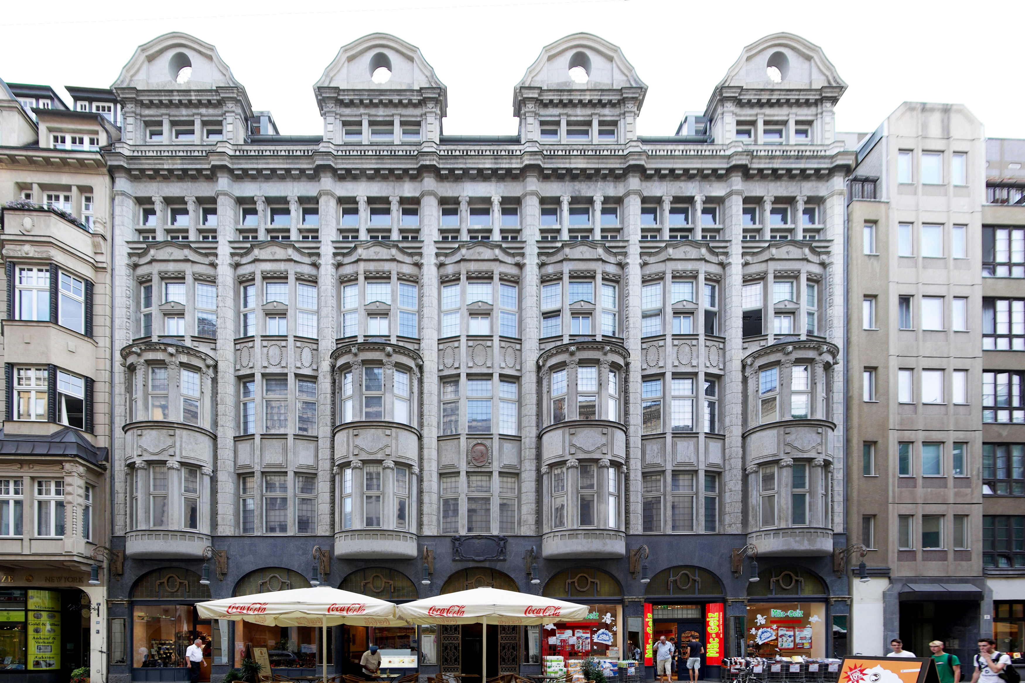 Leipzig, Nikolaistr. 27-29, Zeppelinhaus